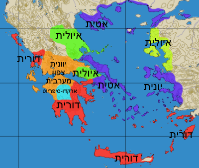 Distribución de los dialectos griegos, ca. 400 adC. El dórico está marcado en rojo, el noroeste de Grecia en naranja